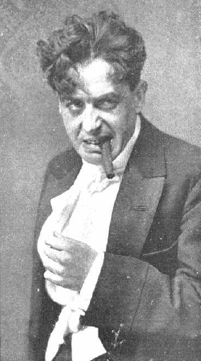 Fotografía del actor español Ernesto Vilches en su interpretación de la obra teatral de Jacinto Benavente La noche del sábado